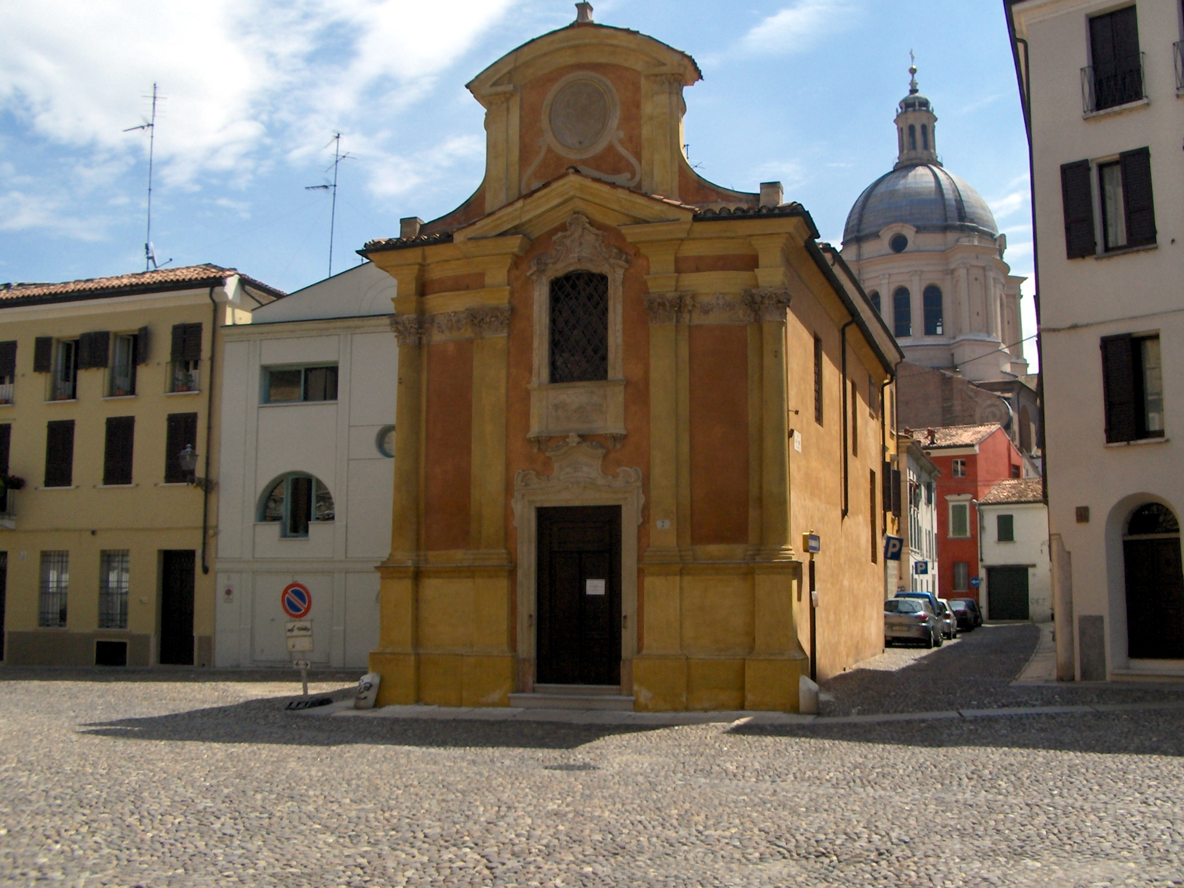 Mantova - Piazza Canossa, Chiesa della Madonna del Terremoto